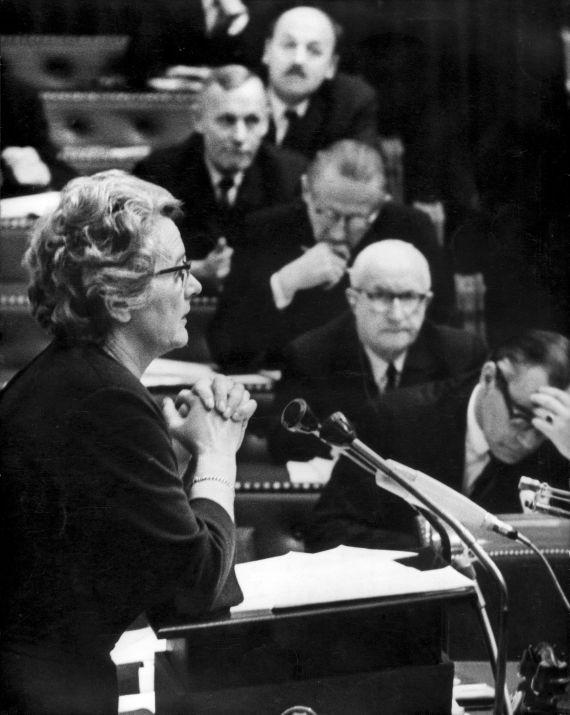 Minister M.A.M. Klompé aan het woord in de Tweede Kamer, tijdens de beantwoording in het debat over de omroep en TV-wet, 17 januari 1967.